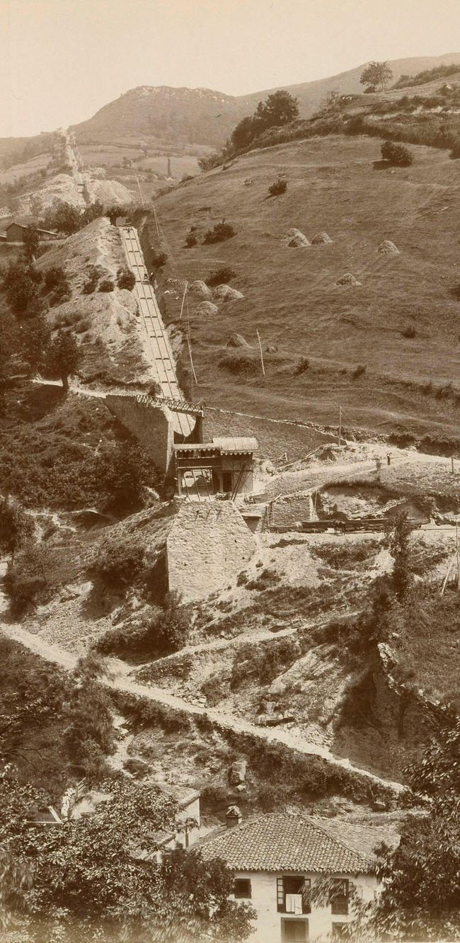 Fotografía incluida en el álbum Inauguración de la línea de Asturias, 15 de agosto de 1884: Ferro-carriles de Asturias, Galicia y León", de 24 fotografías. Esta muestra el plano inclinado construido para las obras en la cercanías de Puente Los Fierros